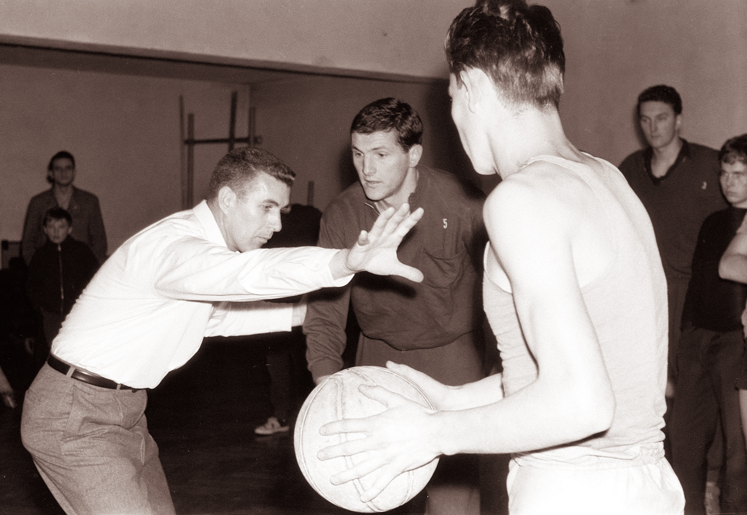 Ameriški trener Blaine Dowler demonstrira elemente košarkarske obrambe igralcem Maribora